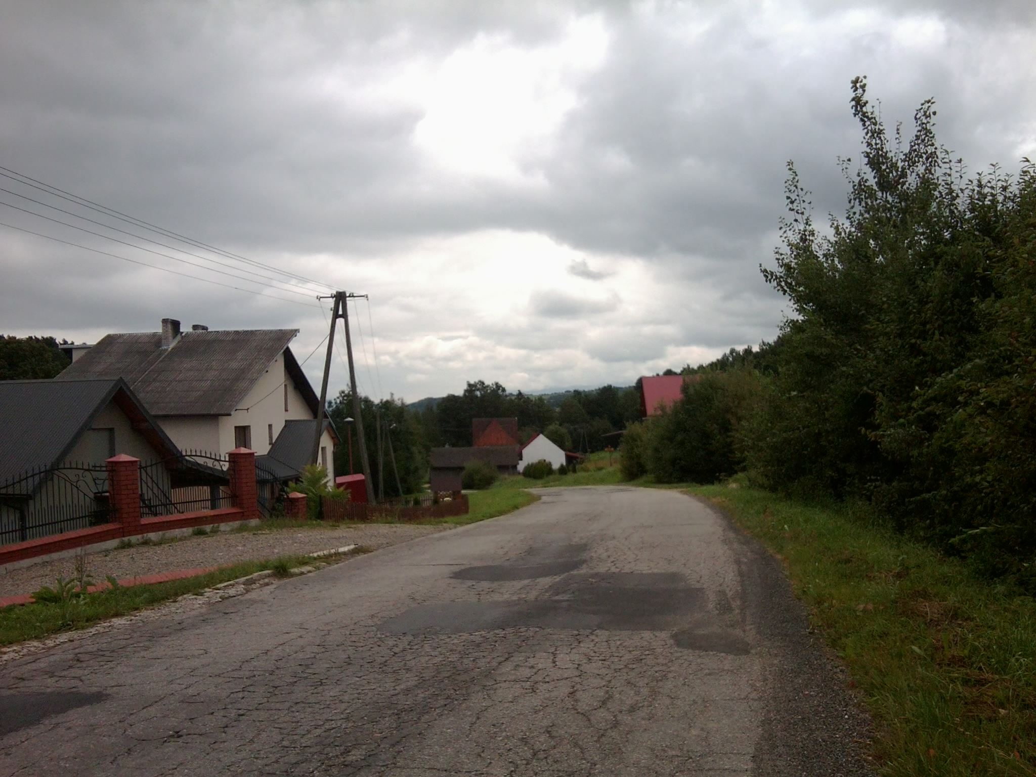 Długołęka-Świerkla - Centrum wsi